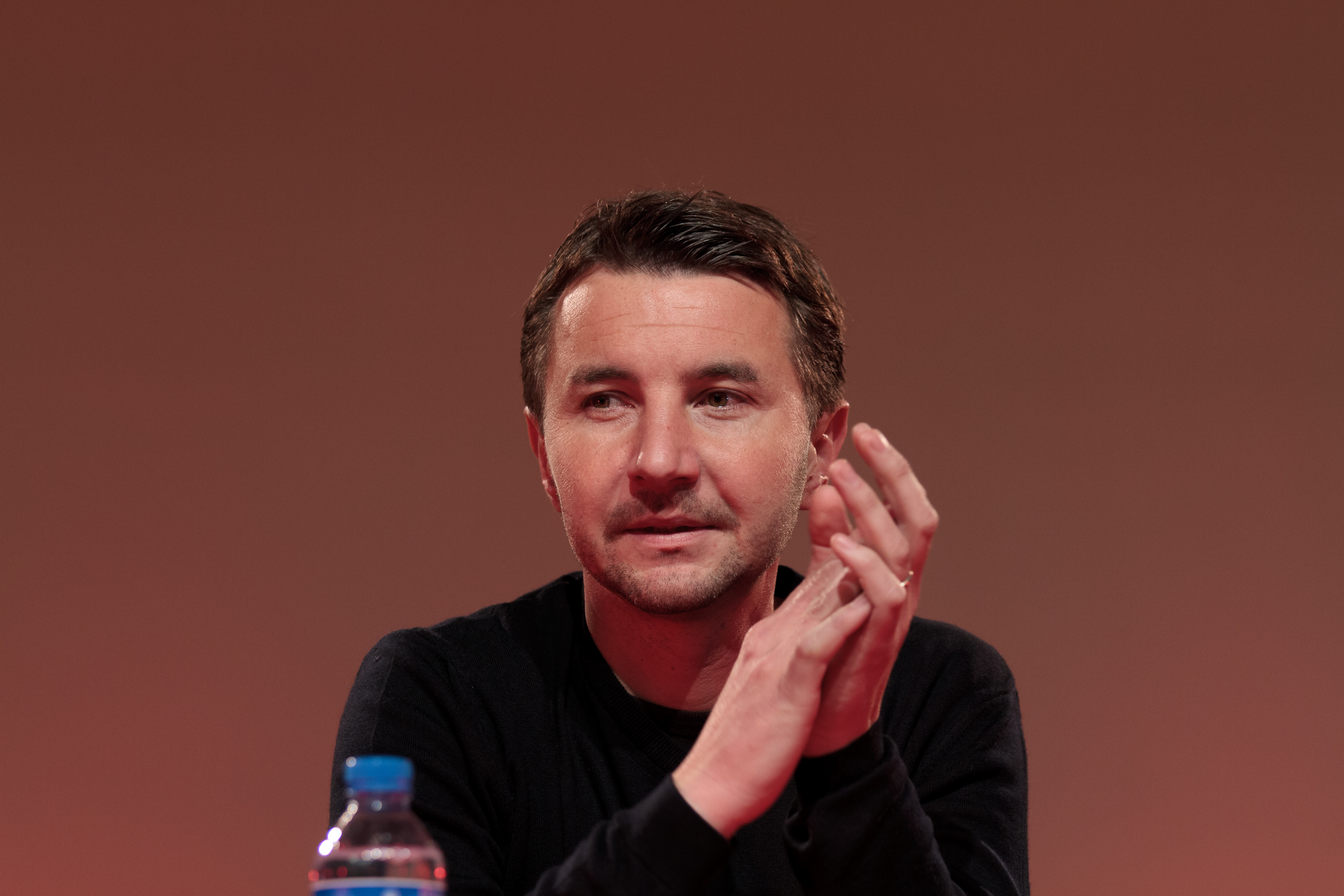 Olivier Besancenot lors du meeting du NPA à Toulouse.